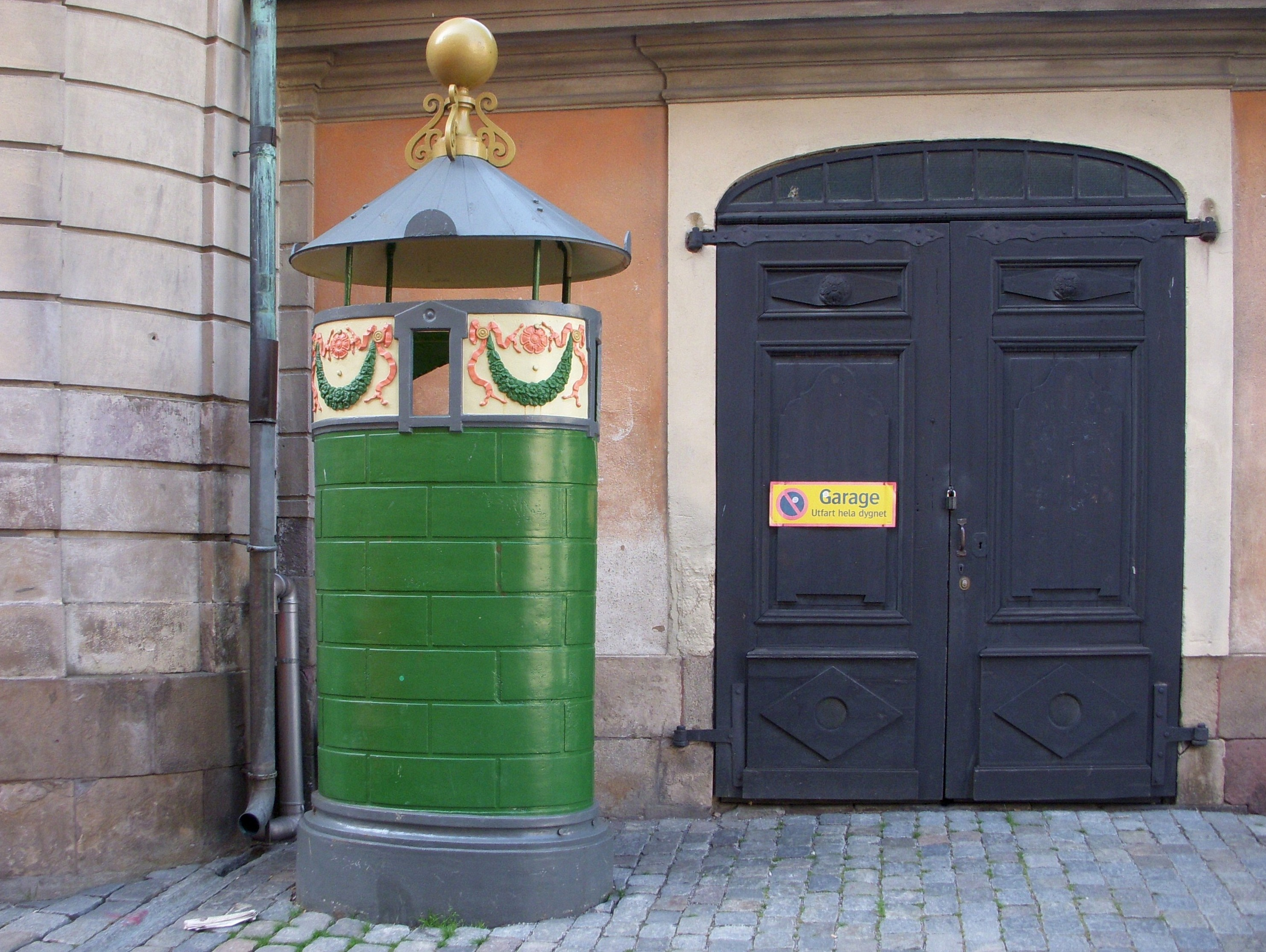 Urinoar från 1890-talet vid Källgränd i Gamla stan